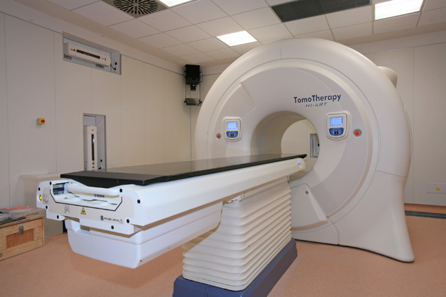 Apparecchiatura di Tomotherapy Hi Art installata nell'Arcispedale di santa Maria Nuova a Reggio Emilia